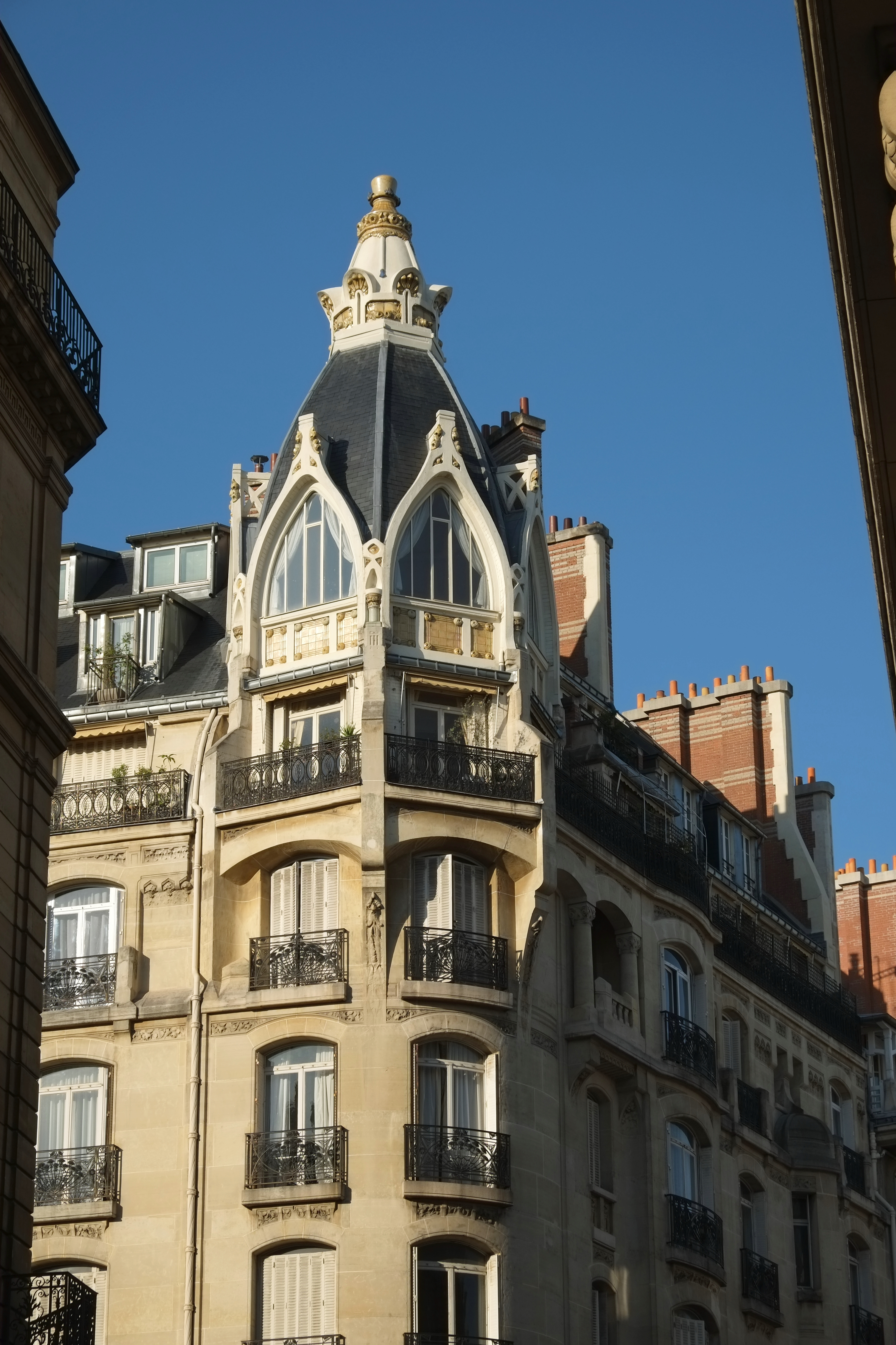 Haus Nr. 132, Rue de Courcelles in Paris